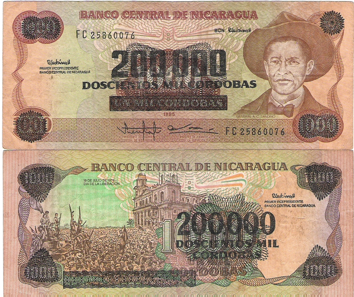 C$200,000 córdobas showing Augusto César Sandino,Reverse-19 de Julio de 1979, dia de la liberacion. Overprinted on unissued 1,000 córdobas. Provisional Issues of 1988-1990.